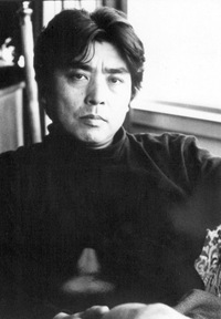 Рю Мураками е японски писател, есеист и режисьор